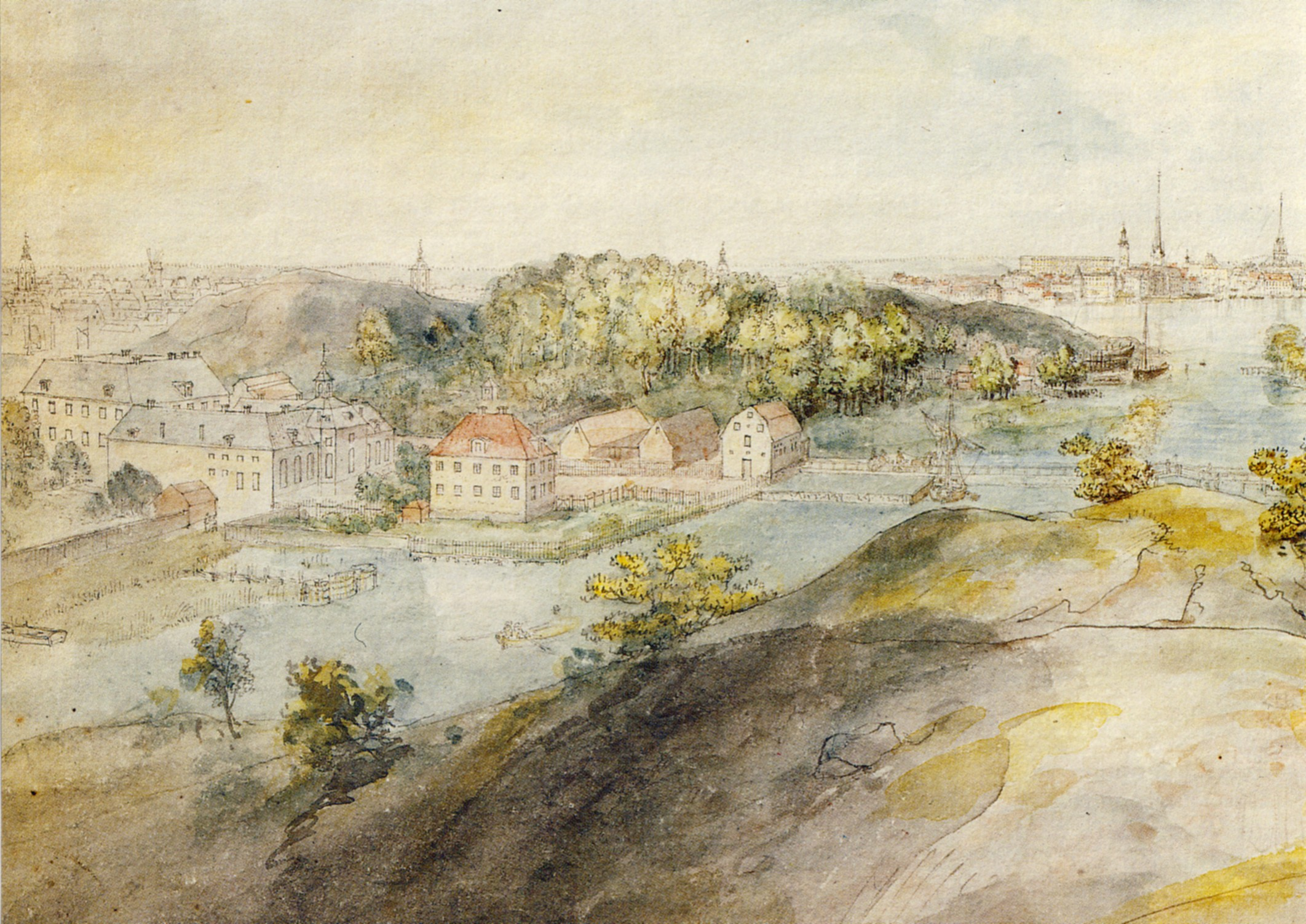 Långholmen med Långholmens spinnhus (beskärning)